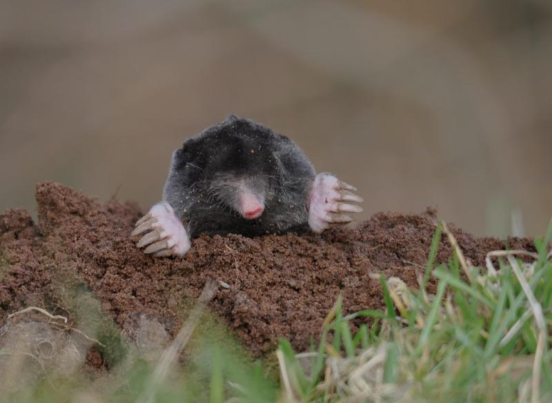 Uit de grond komende mol (Talpa europaea)